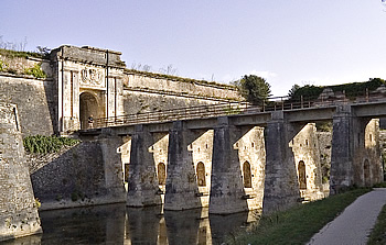 Porte de la citadelle du Chateau d'Oléron - îZle d'Oléron Photo issue de ma banque d'images personnelle : Pep.per 19 mars 2006 à 23:27 (CET)